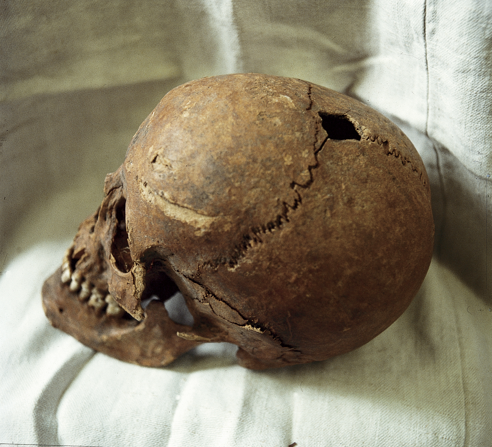 Kranie från malmös galgbacke vid Rörsjön.